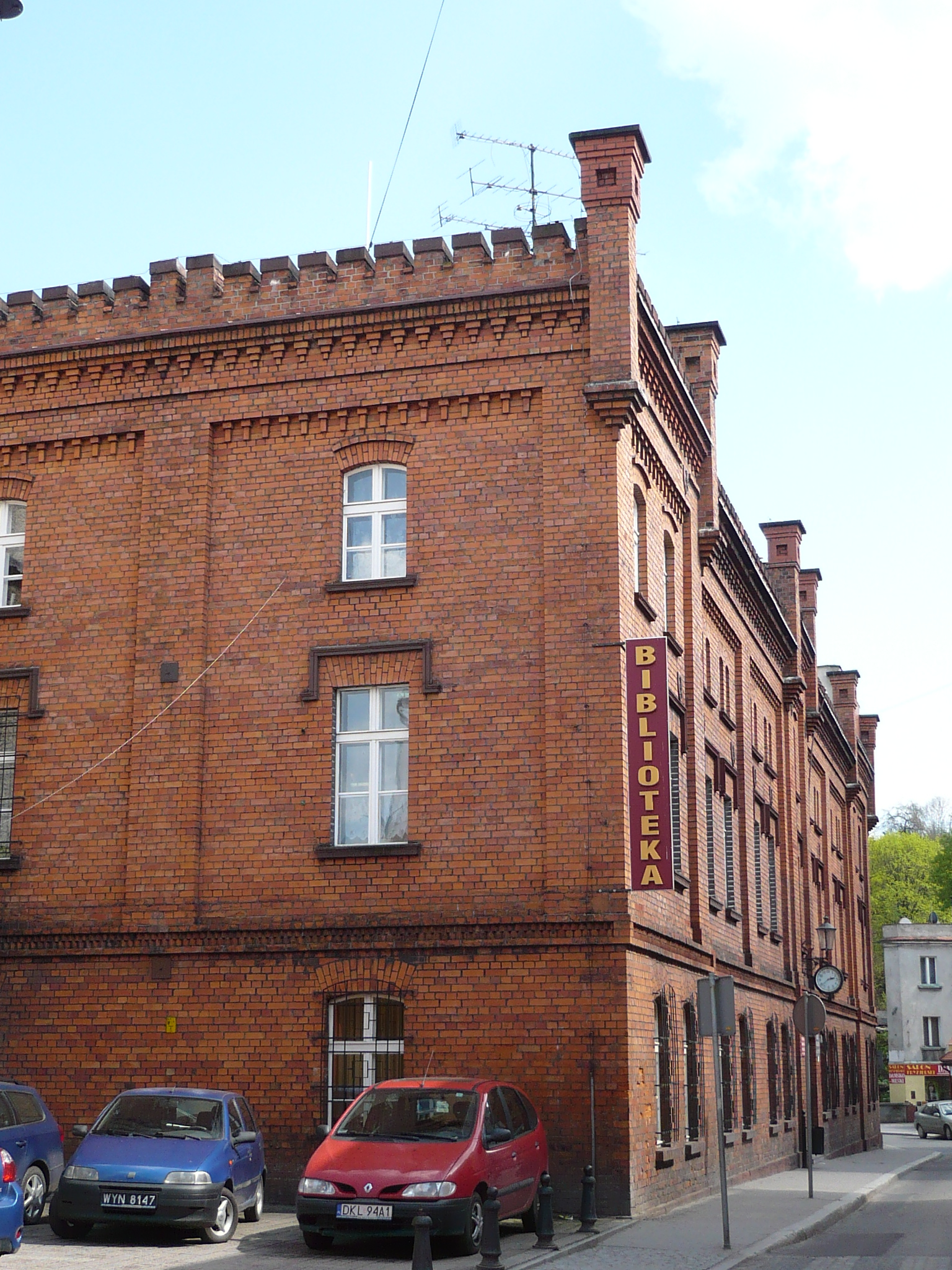 Nowa Ruda, ul. Bohaterów Getta 10 - budynek dawnego browaru z 1849 r., obecnie siedziba Miejskiej Biblioteki Publicznej